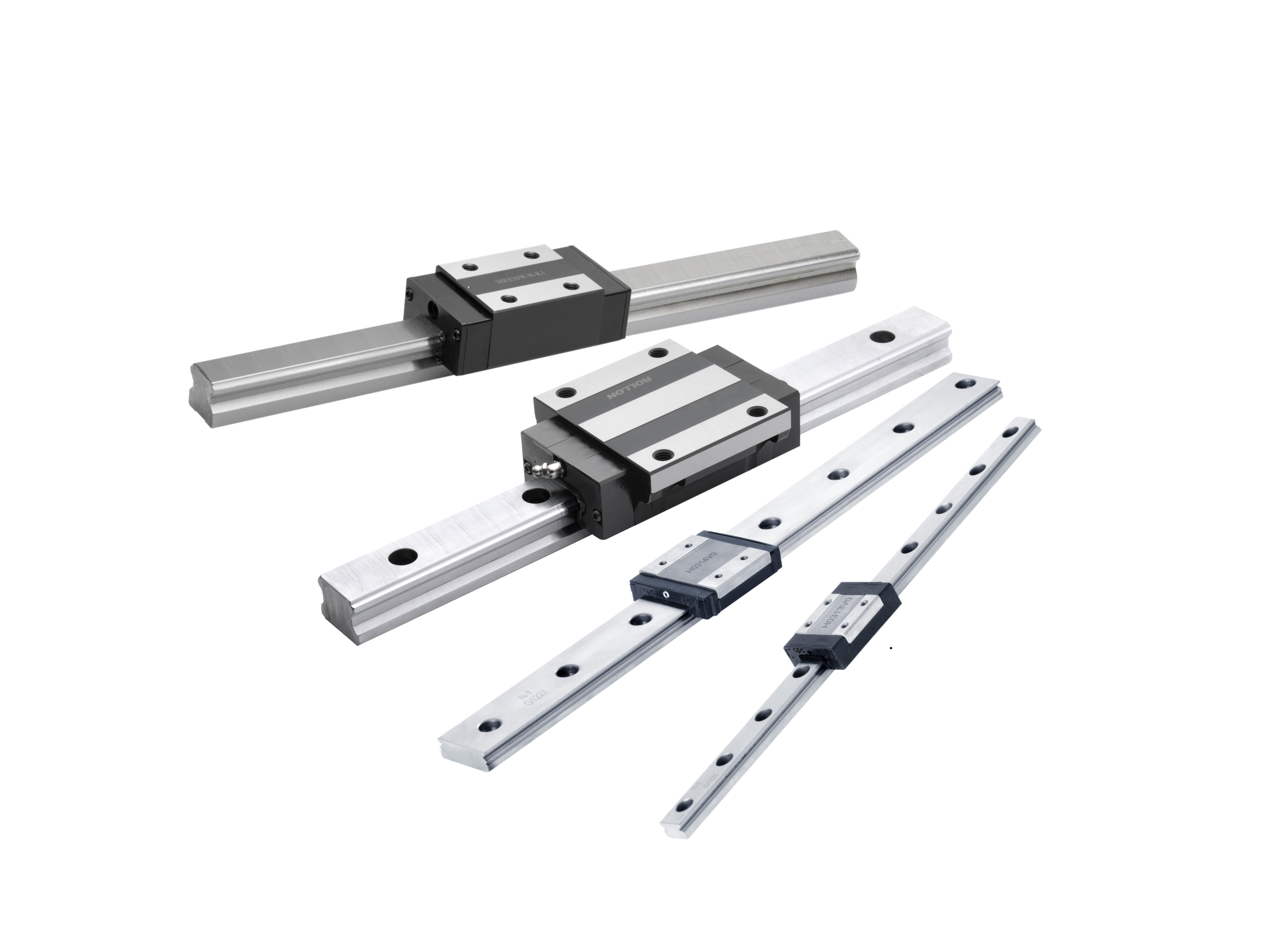 Mono Rail